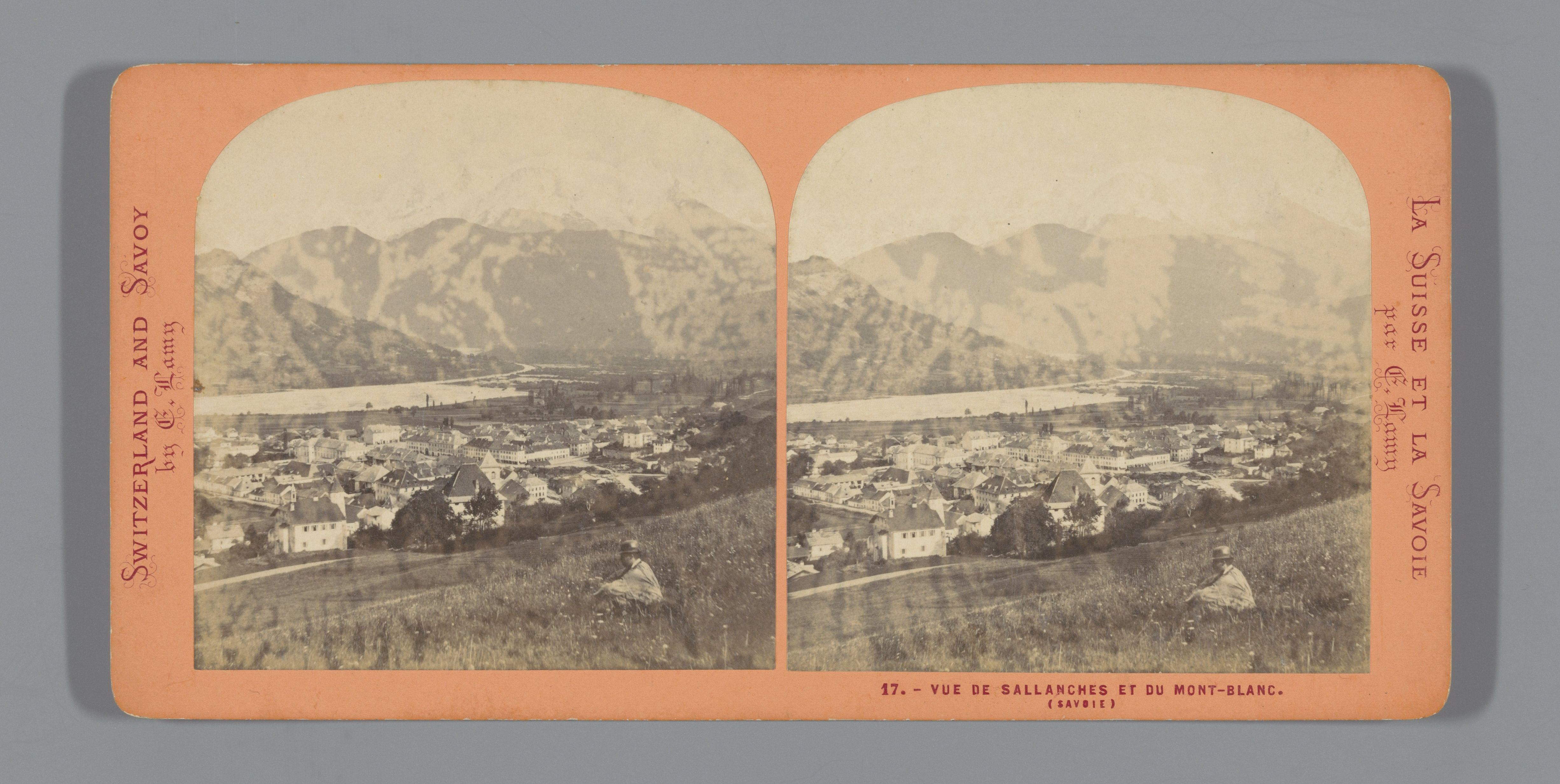 IdentificatieTitel(s): Gezicht op Sallanches, met op de achtergrond de Mont BlancVue de Sallanches et du Mont-Blanc. (Savoie) (titel op object)La Suisse et la Savoie (serietitel)Objecttype: stereofoto Objectnummer: RP-F-F06436Opschriften / Merken: nummer, recto, gedrukt: ‘17.’VervaardigingVervaardiger: fotograaf: Ernest Eléonor Pierre Lamy (vermeld op object)Plaats vervaardiging: AlpenDatering: ca. 1860 - ca. 1880Materiaal: karton fotopapier Techniek: albuminedrukAfmetingen: secundaire drager: h 85 mm × b 170 mmOnderwerpWat: city-view in general; 'veduta'mountainsWaar: Mont BlancSallanchesVerwerving en rechtenVerwerving: overdracht van beheer 1994Copyright: Publiek domein